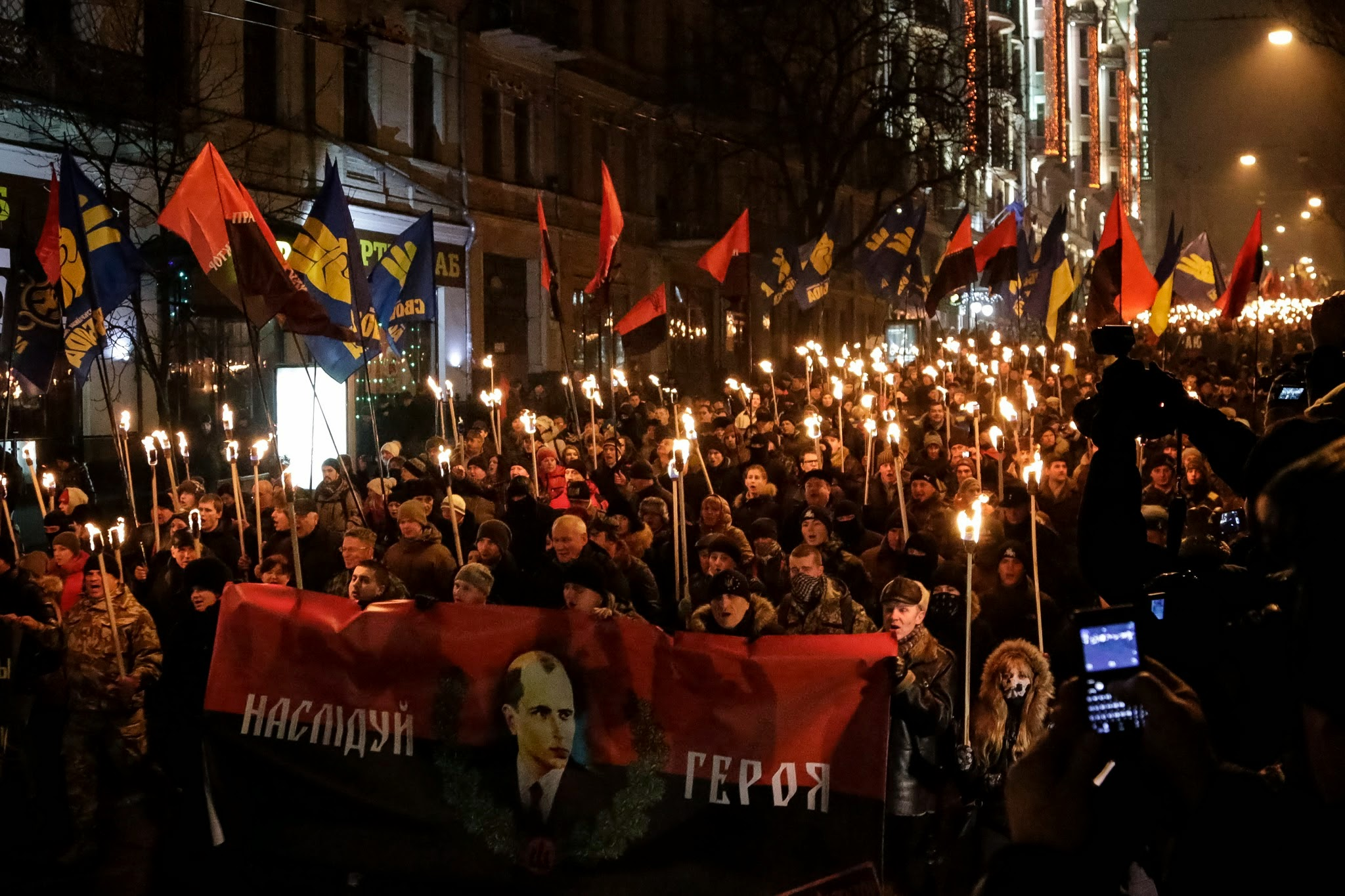 Смолоскипний марш на честь річниці від дня народження С. Бандери. Київ, 1 січня 2015